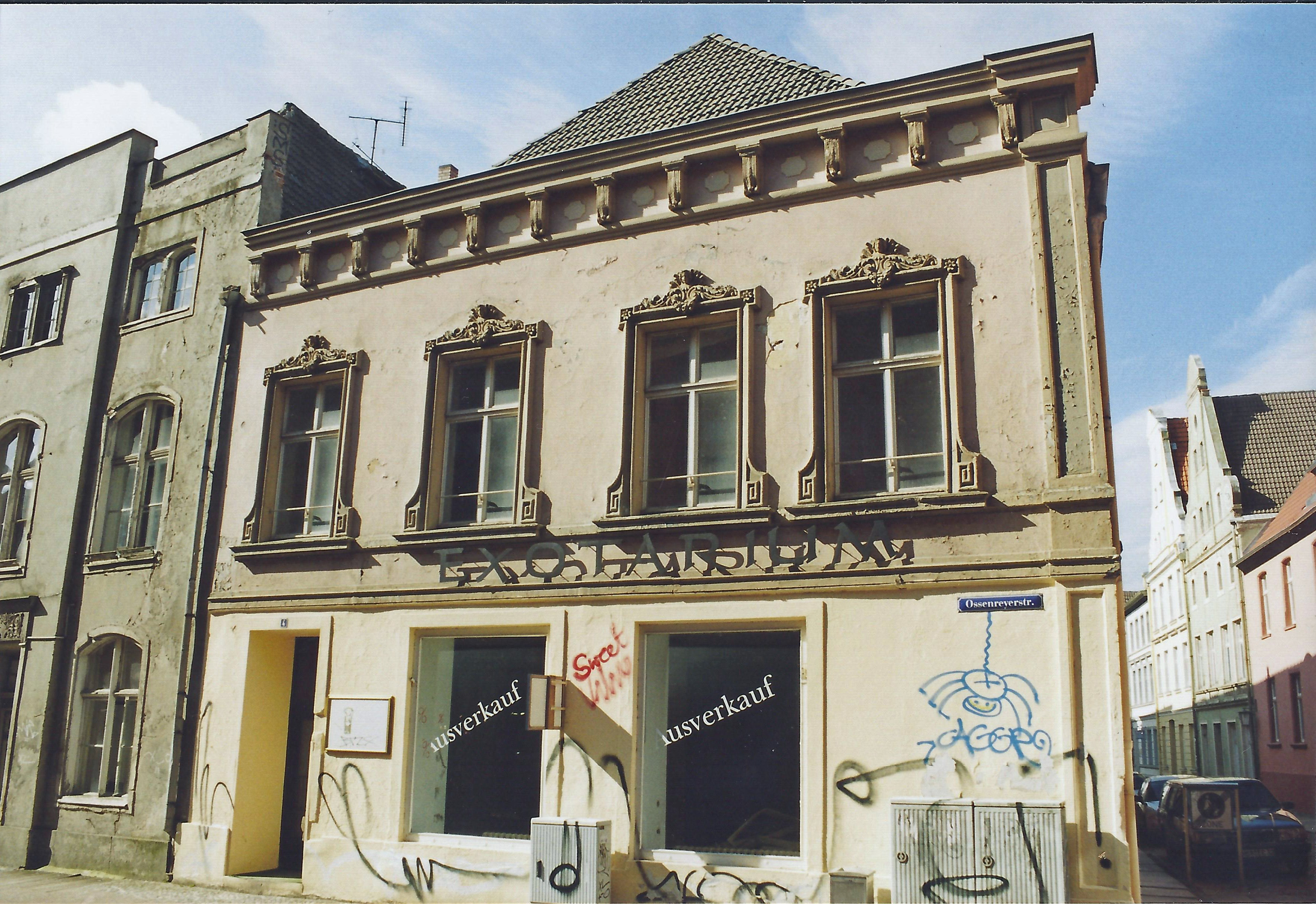 Das als Papierabzug vorliegende Foto habe ich am 5. August 2012 eingescannt und etwas bearbeitet. Das ungefähre Aufnahmedatum steht im Dateinamen; dies ist oft nur der Monat und das Jahr der Filmentwicklung. Zustand im Jahr 2012: saniert.